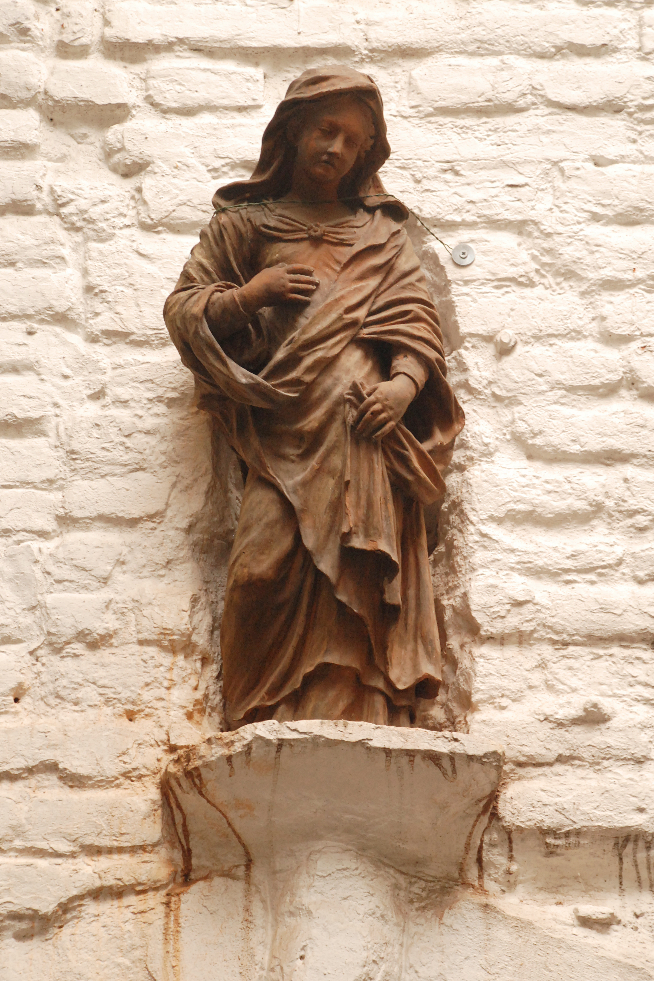 Belgique - Bruxelles - Impasse des Cadeaux